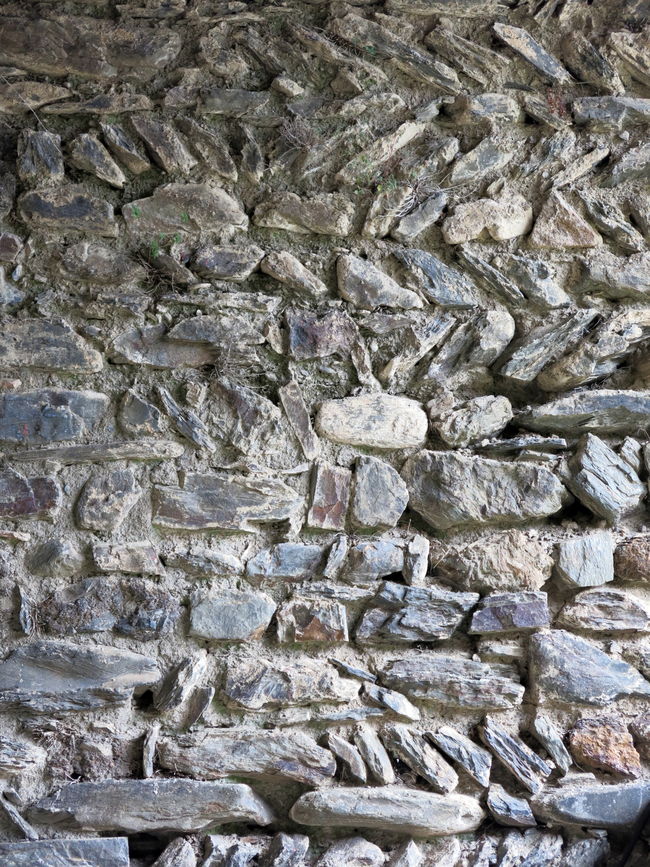 Conjunt monàstic de Sant Quirze de Colera (Rabós)